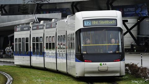 Photo et texte [Steffen Schmidt - Keystone] La nouvelle ligne 12 relie Dübendorf à l'aéroport de Zurich. La troisième et dernière étape du Glattalbahn a été inaugurée lors d'une fête samedi dans l'agglomération nord de Zurich. La nouvelle ligne de tram relie Dübendorf à l'aéroport, région habitée par 100'000 personnes. Le nouveau tracé, d'une longueur de 11,3 kilomètres, vise à soutenir le rapide développement du Glattal. Le projet avait été accepté par le peuple en 2003.